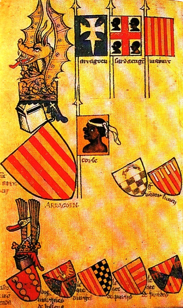 Stemmi degli stati della Corona d'Aragona dallo stemmario di Gelre (seconda metà del XIV secolo)